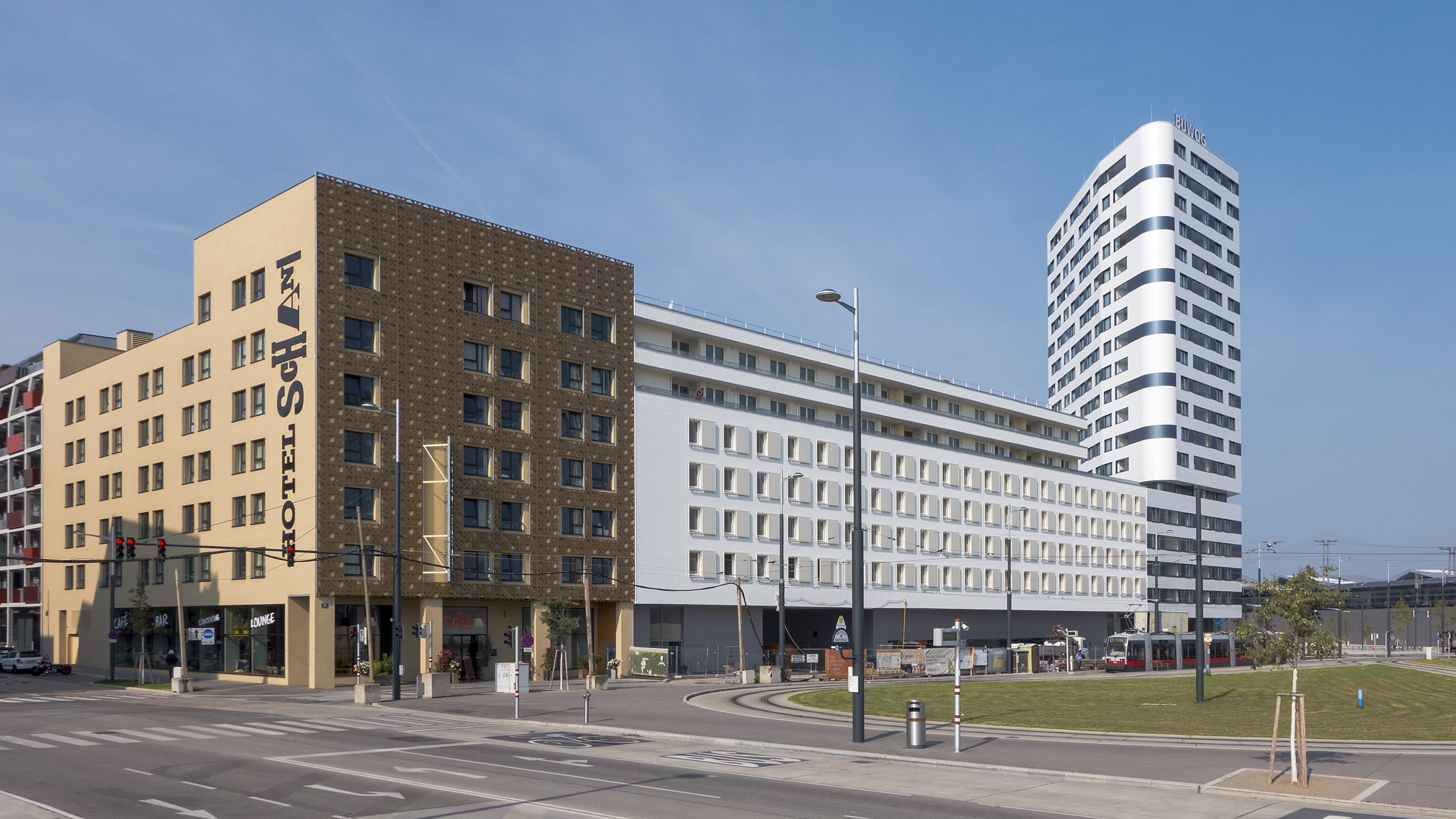 Sonnwendviertel in Wien 10 bei der Gerhard-Bronner-Straße